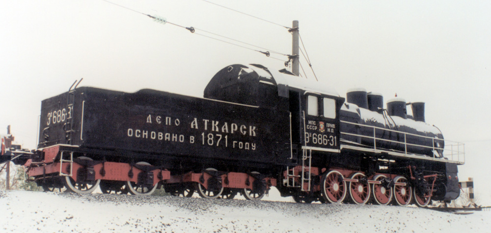 Паровоз-памятник Эу-686-31 на станции Аткарск